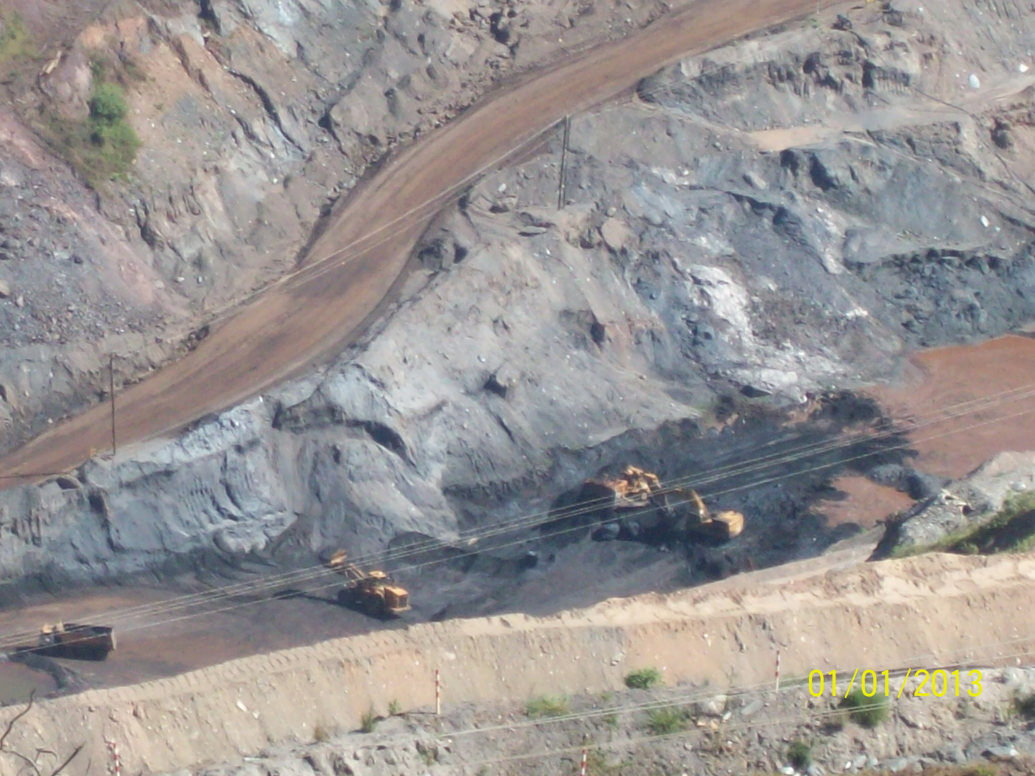 Itabira MG Brasil - Mineração Vale